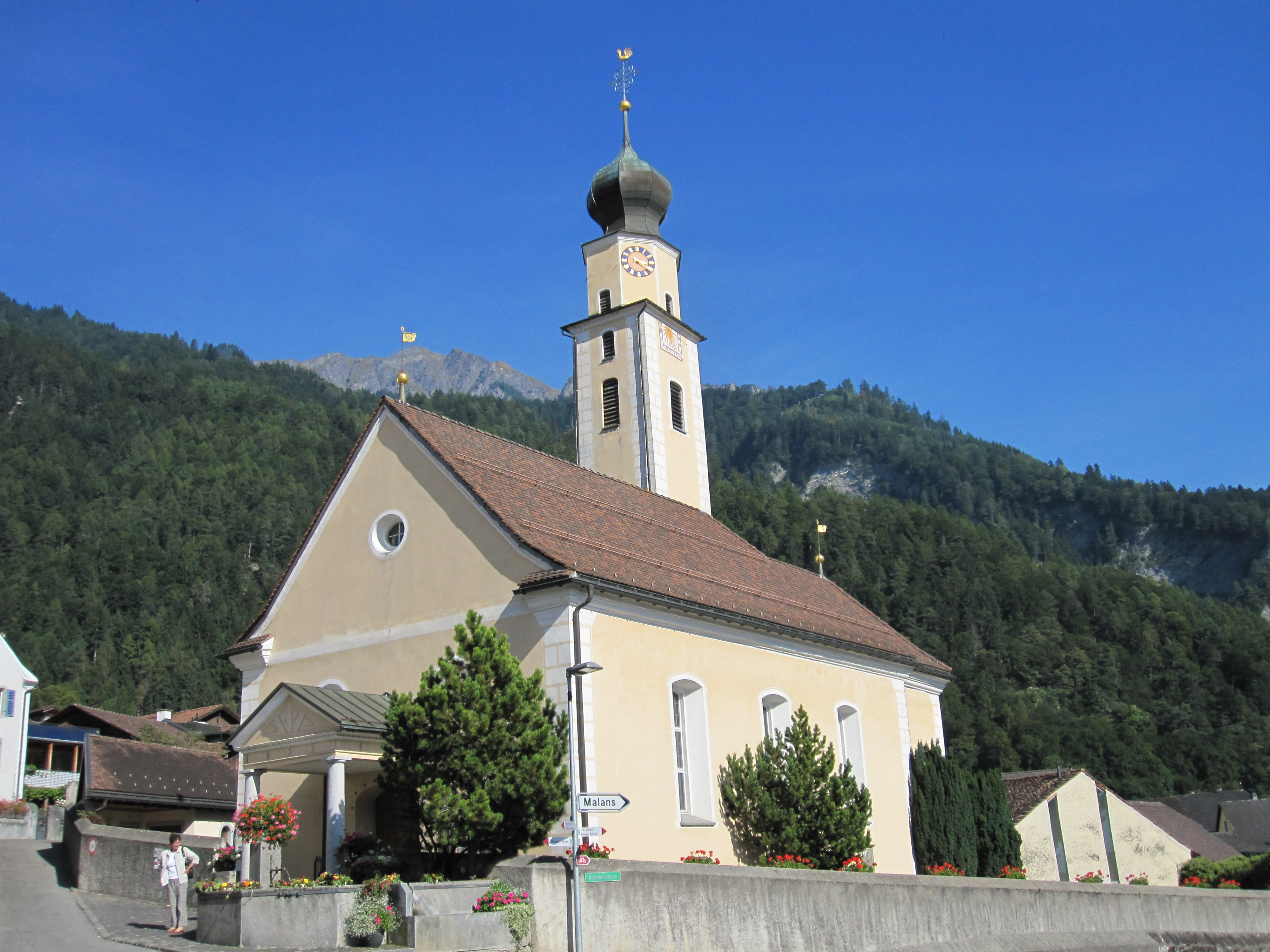 reformierte Kirche Jenins (Kanton Graubünden)